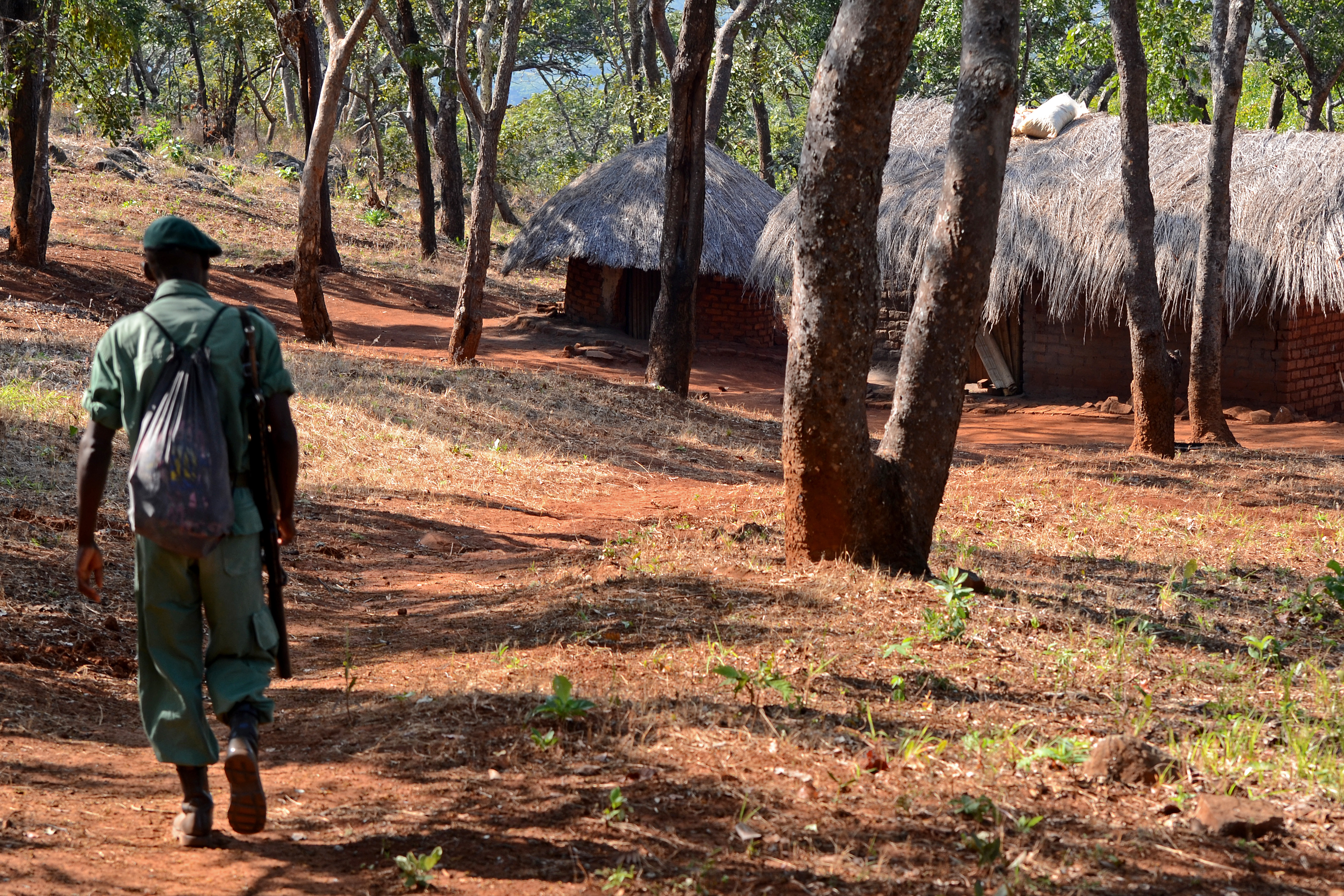 Nkhotakota Game Reserve, Malawi